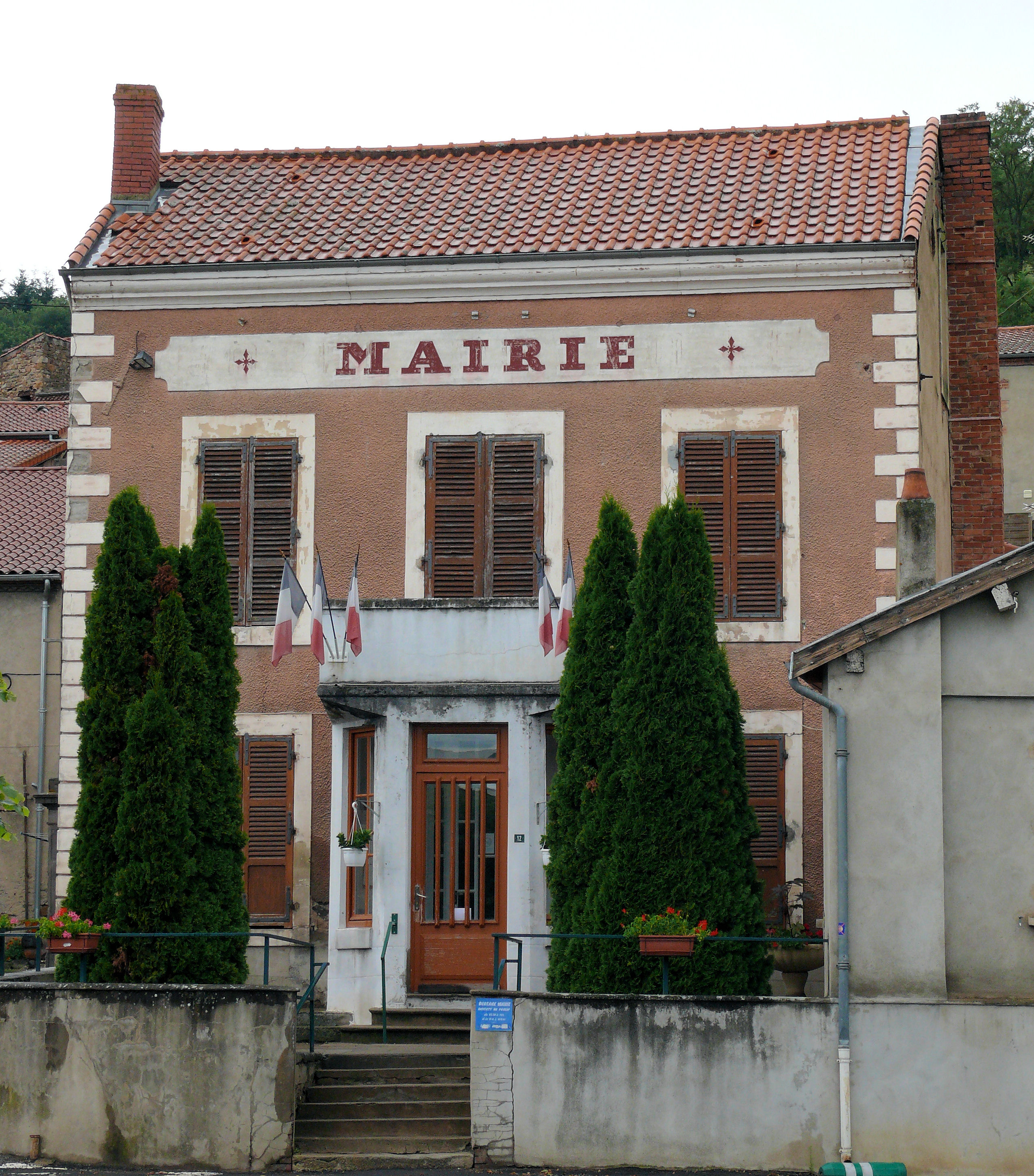 Auzat-la-Combelle - Mairie